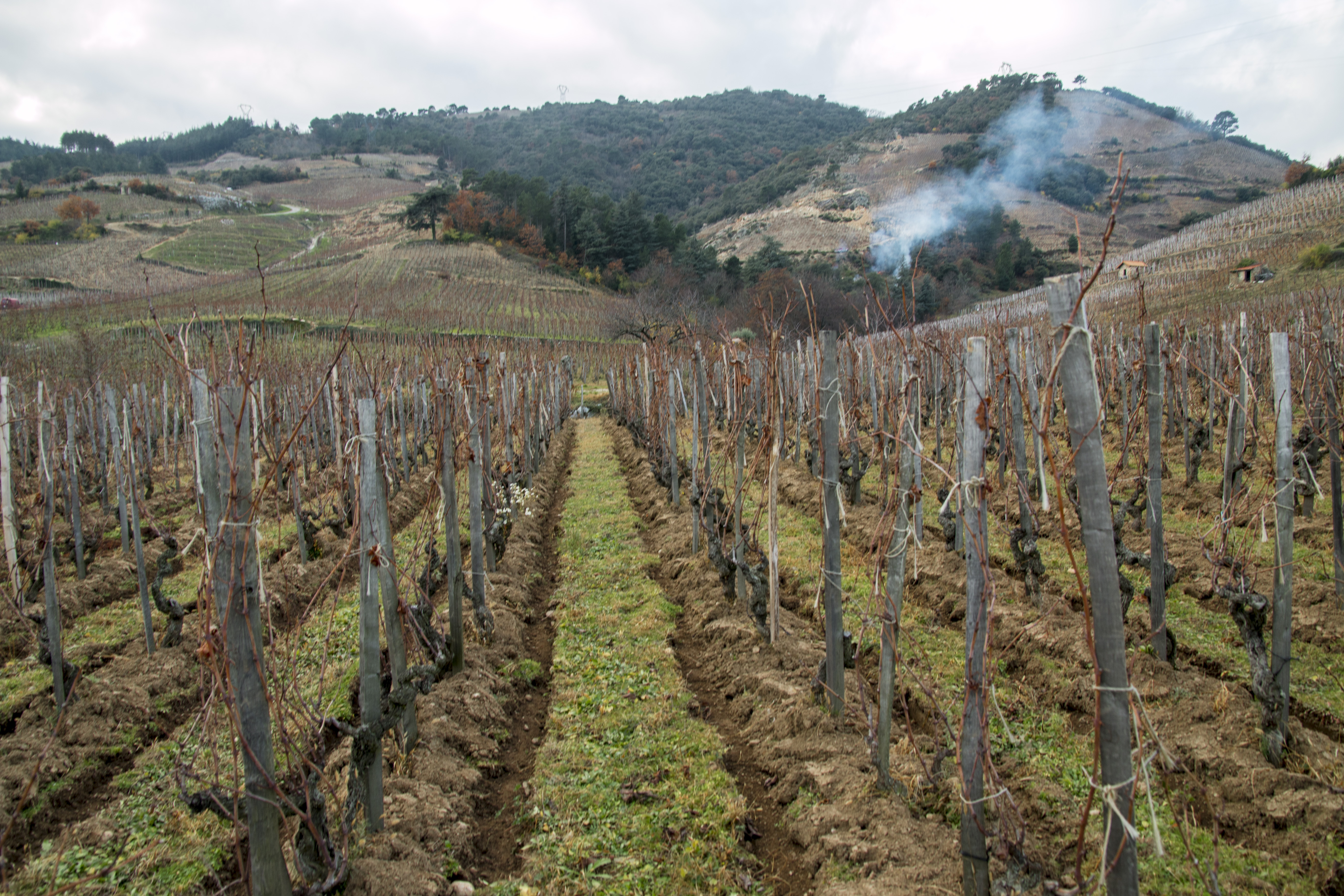 buttage